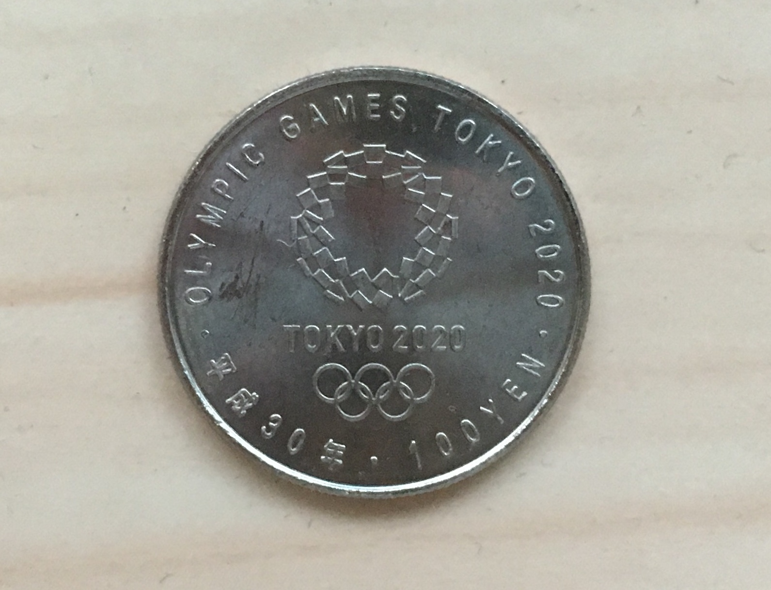 2020年東京オリンピック記念貨幣(裏)。